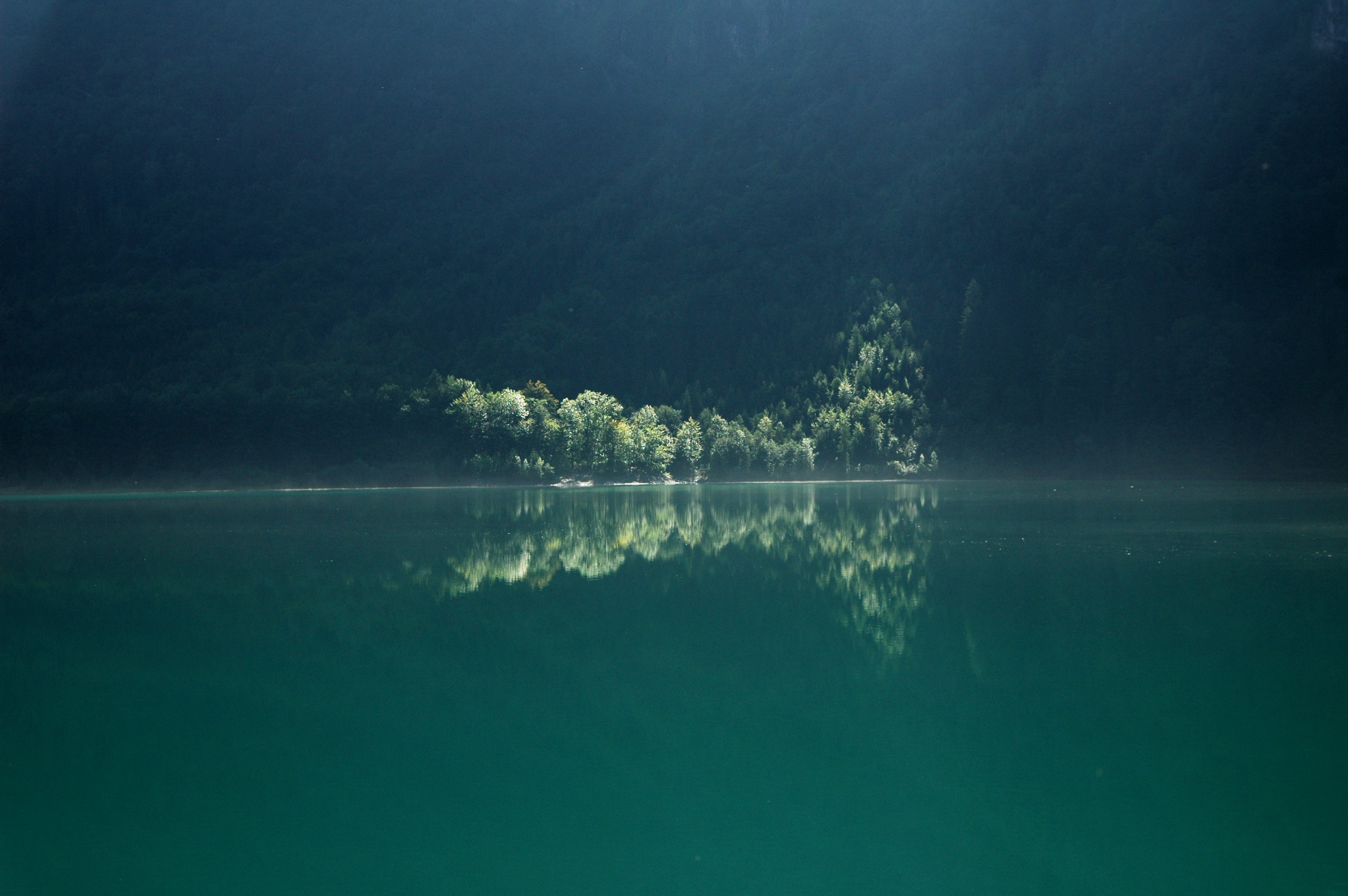 Klöntalersee